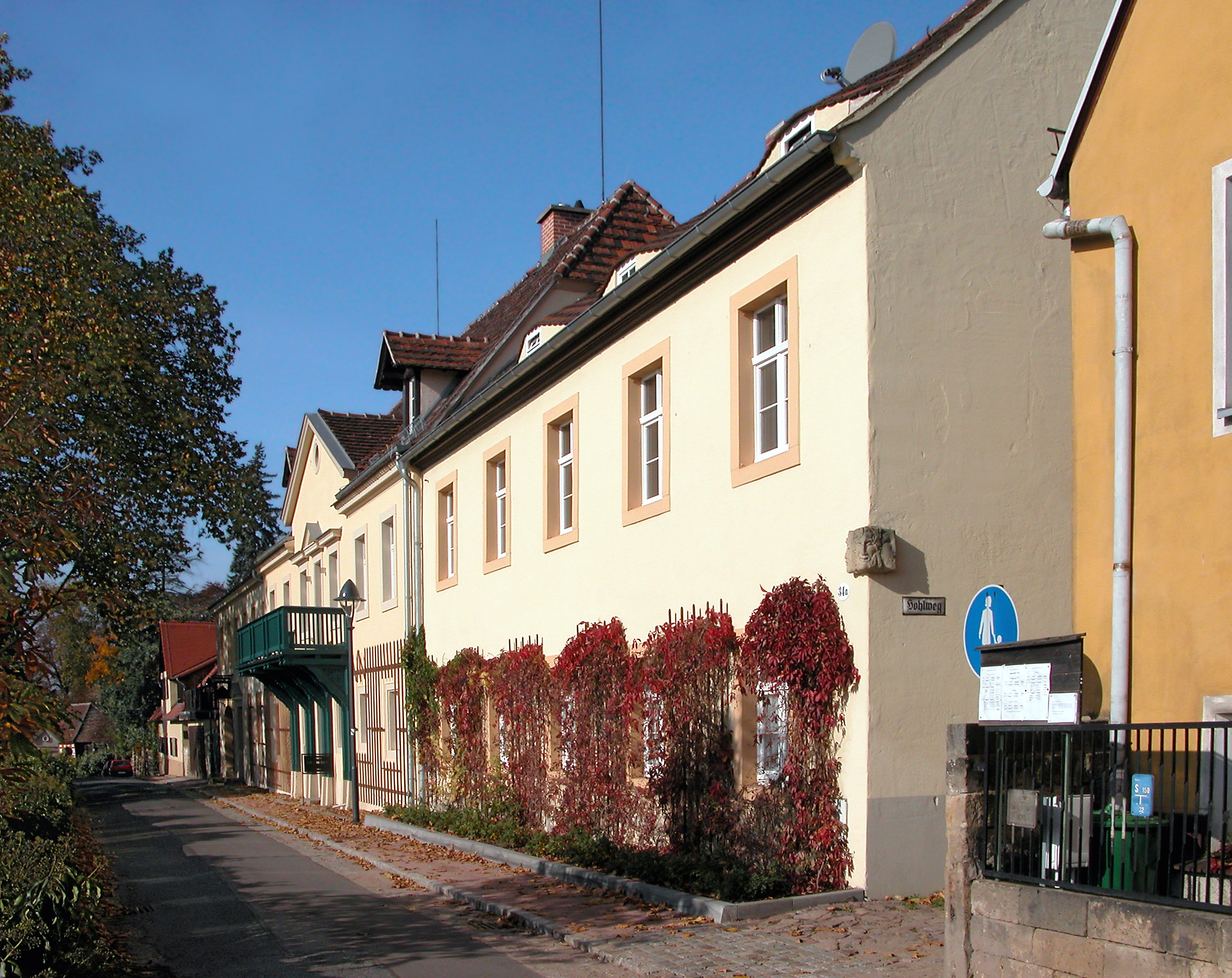 27.10.2005 01445 Radebeul-Oberlößnitz: Weinbergstraße 34/34A. Weingut "Drei Herren" (historisch Herrmannsberg). [DSCN7985.TIF]20051027065DR.JPG(c)Blobelt